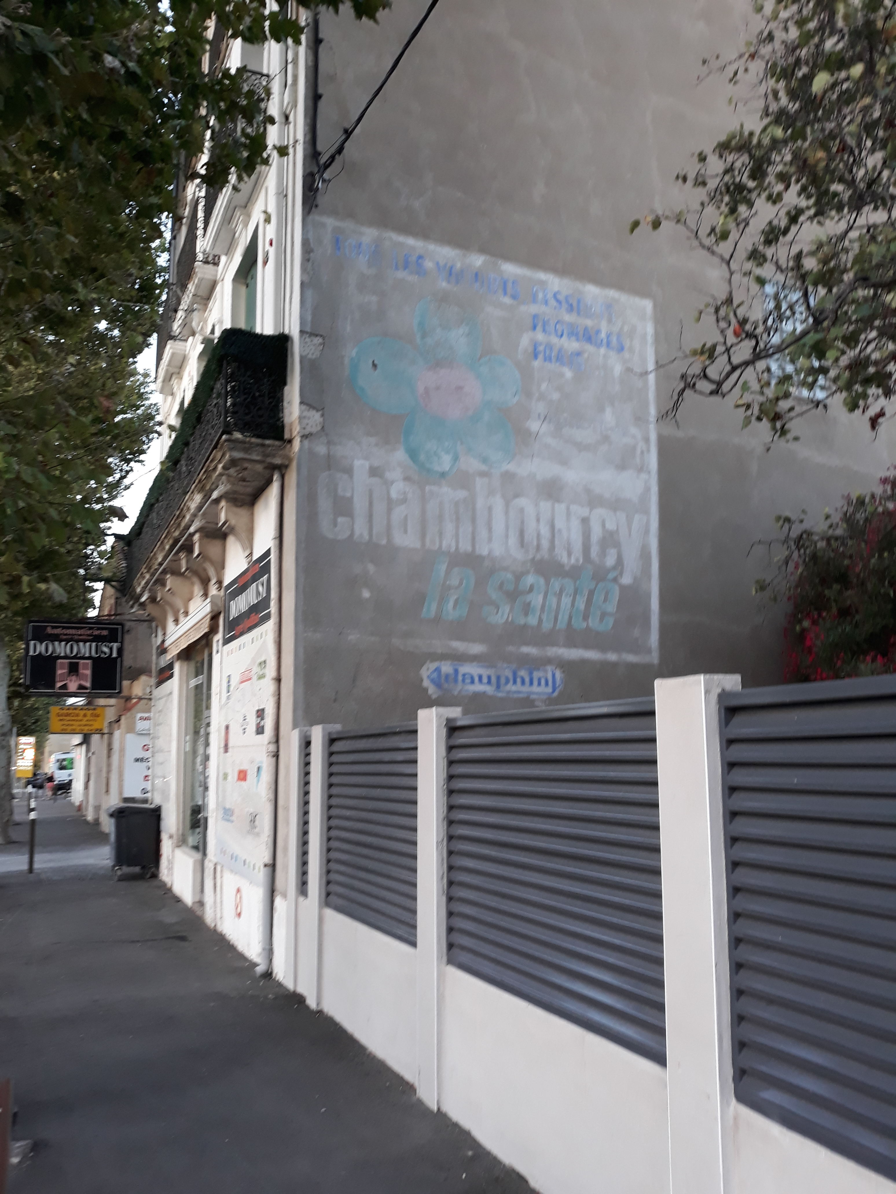 Reklame für den früheren französischen Lebensmittelkonzern Chambourcy in Narbonne (Aude).